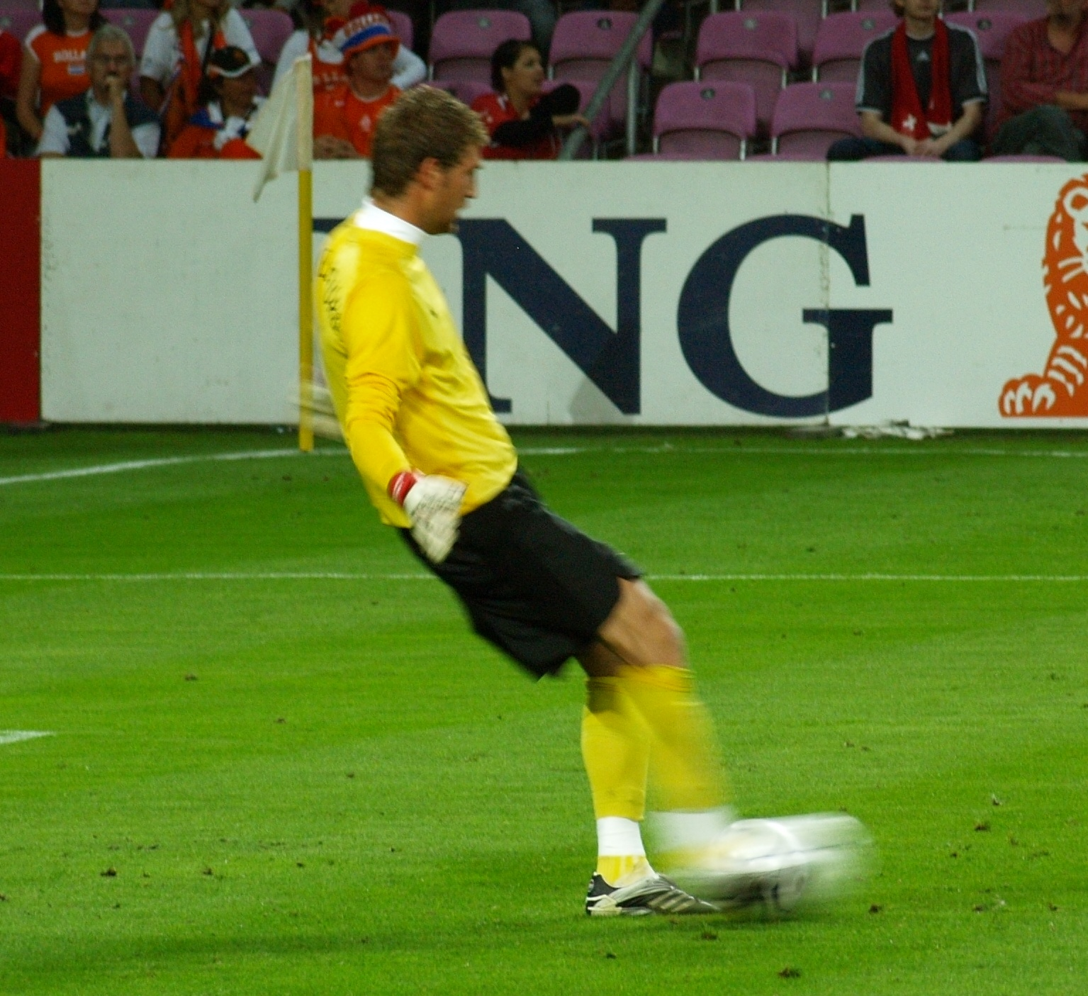 Maarten Stekelenburg